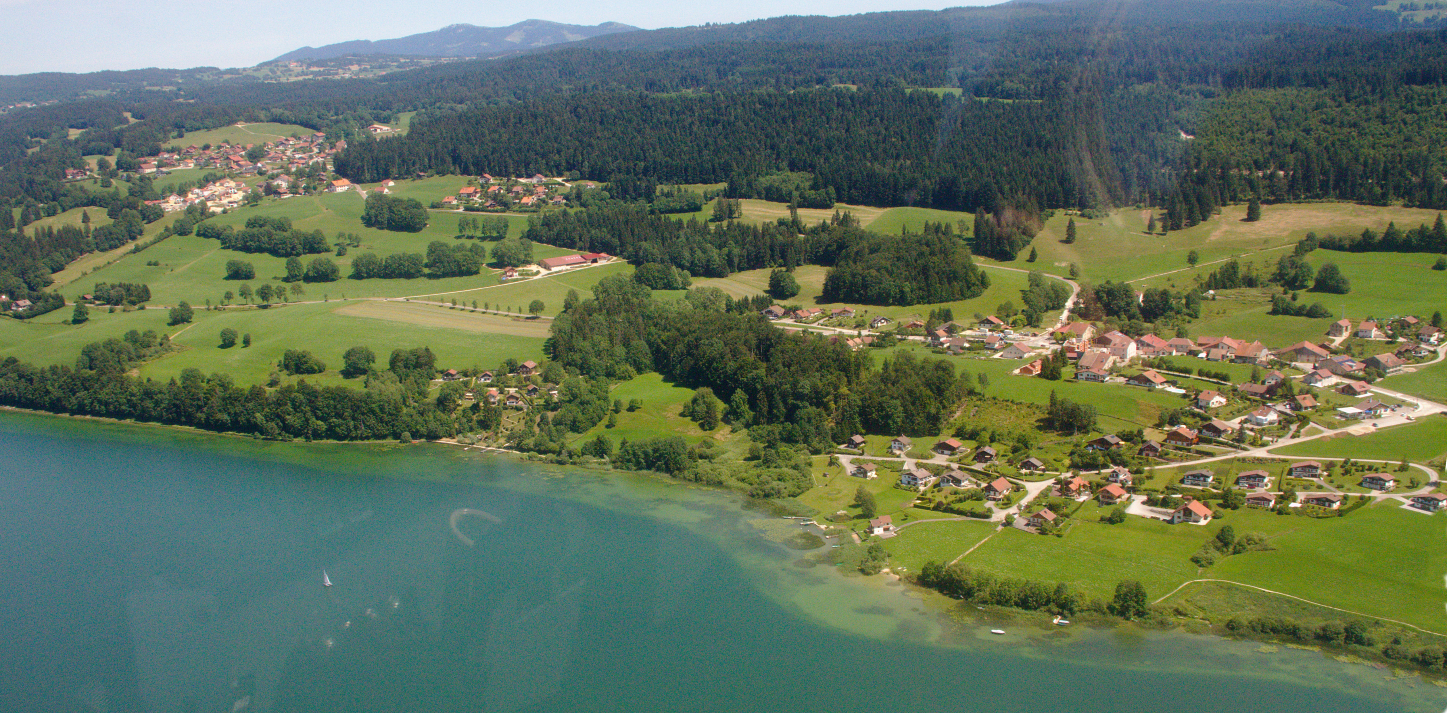 Montperreux vue aérienne